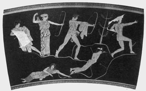 Pittore dei niobidi, calice del louvre, 460 a.c.